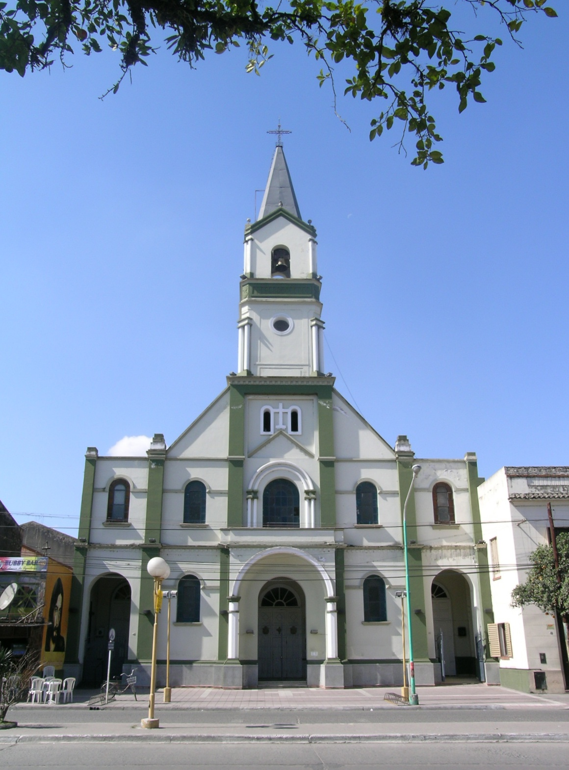 Kirche in Aguilares